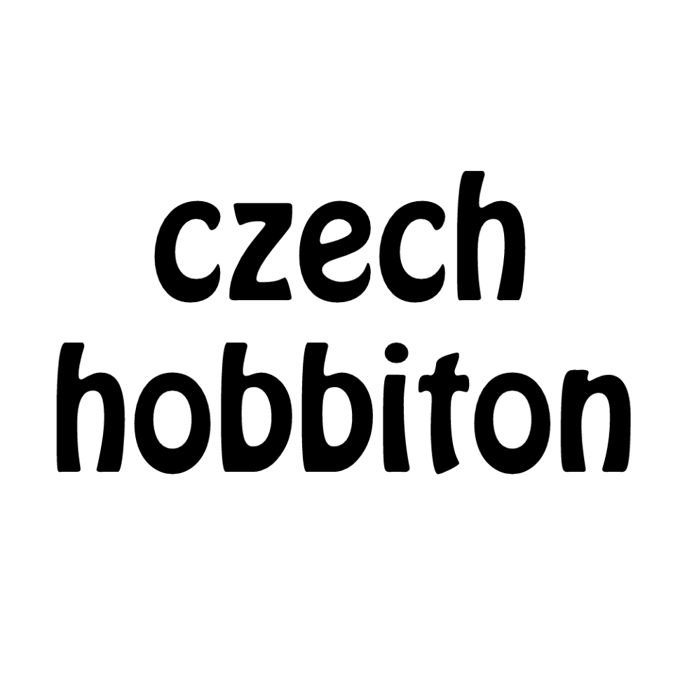 Czech Hobbiton